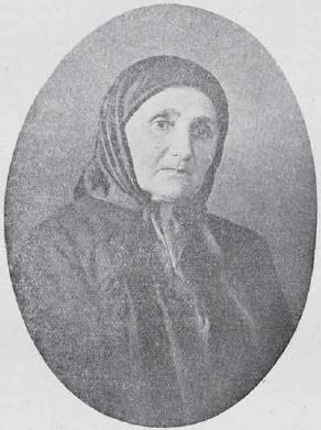 Анастасия Узунова.